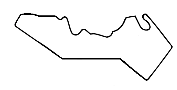 Guia motorsport circuit in Macau.